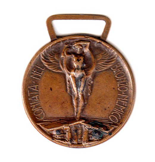 Medaglia commemorativa della guerra italo-austriaca 1915-1918 - rovescio - coniata nel bronzo nemico